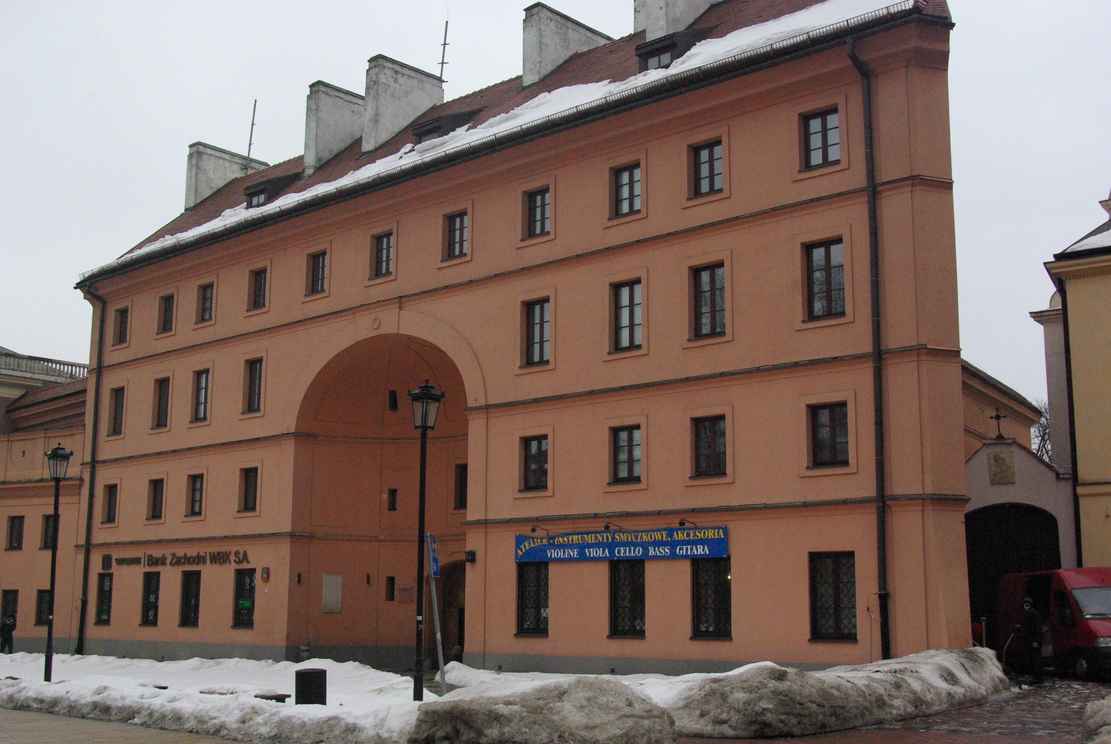 elewacja frontowa dziekanki na ulicy krakowskie przedmieście 56